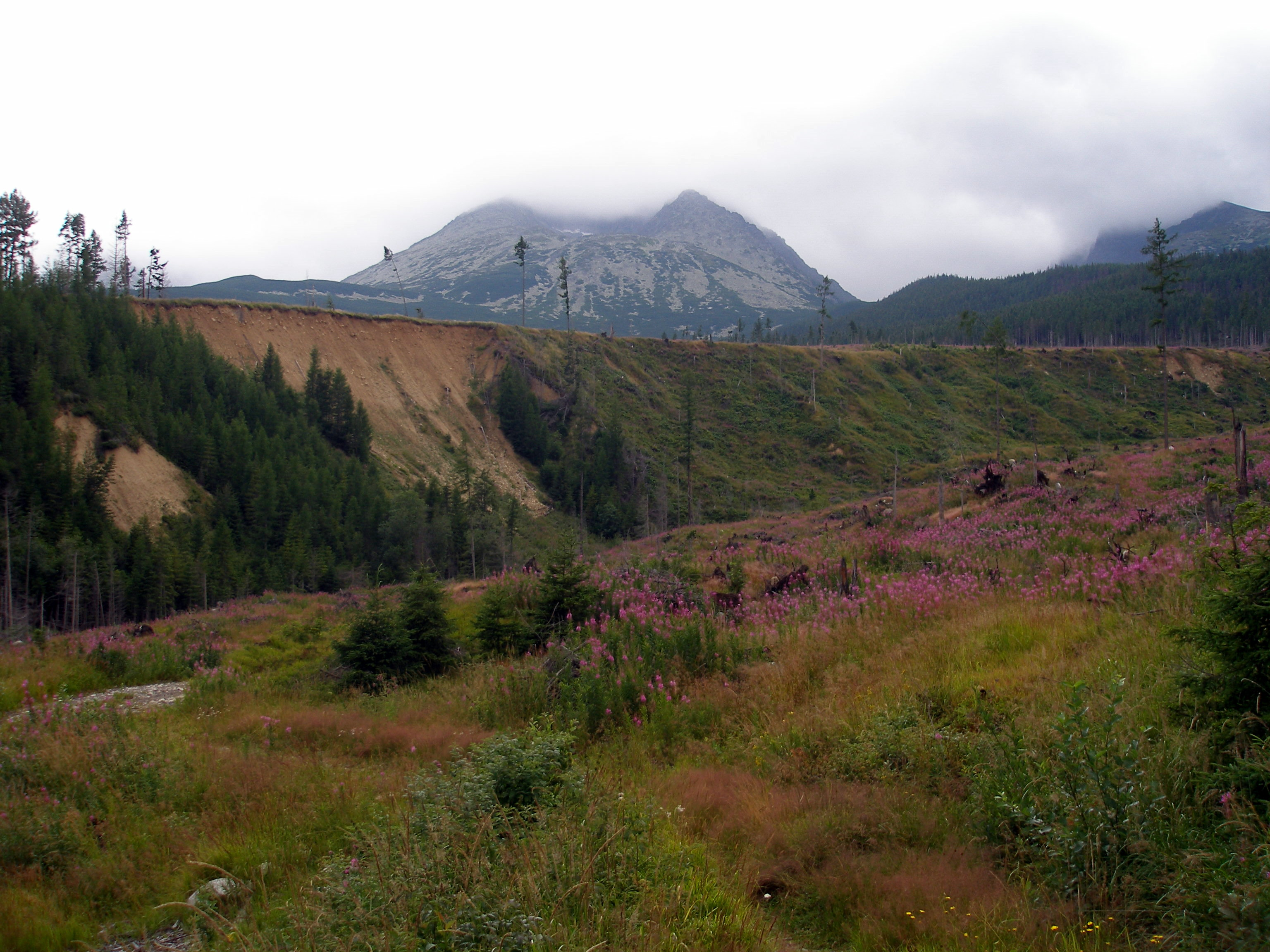 Vŕbka úzkolistá (Chamaenerium angustifolium). Tatranská Polianka osada vo Vysokých Tatrách